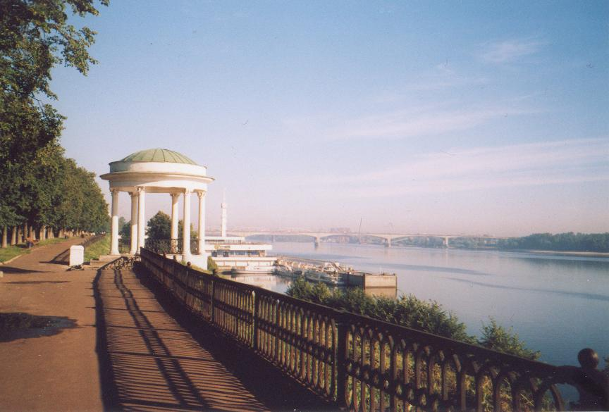 Волжская набережная в Ярославле. Беседка любви, к которой по традиции приезжают на свадьбе.